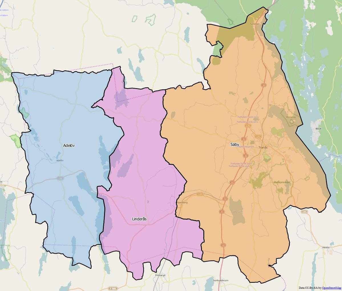 Distriktsindelningen i Tranås kommun World file: 48.56200075894412294 0 0 -48.56200075894412294 1622563.54494043369777501 8000439.08299221657216549